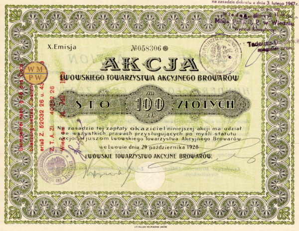 Akcja Lwowskiego Towarzystwa Akcyjnego Browarów wyemitowana w 1928 roku